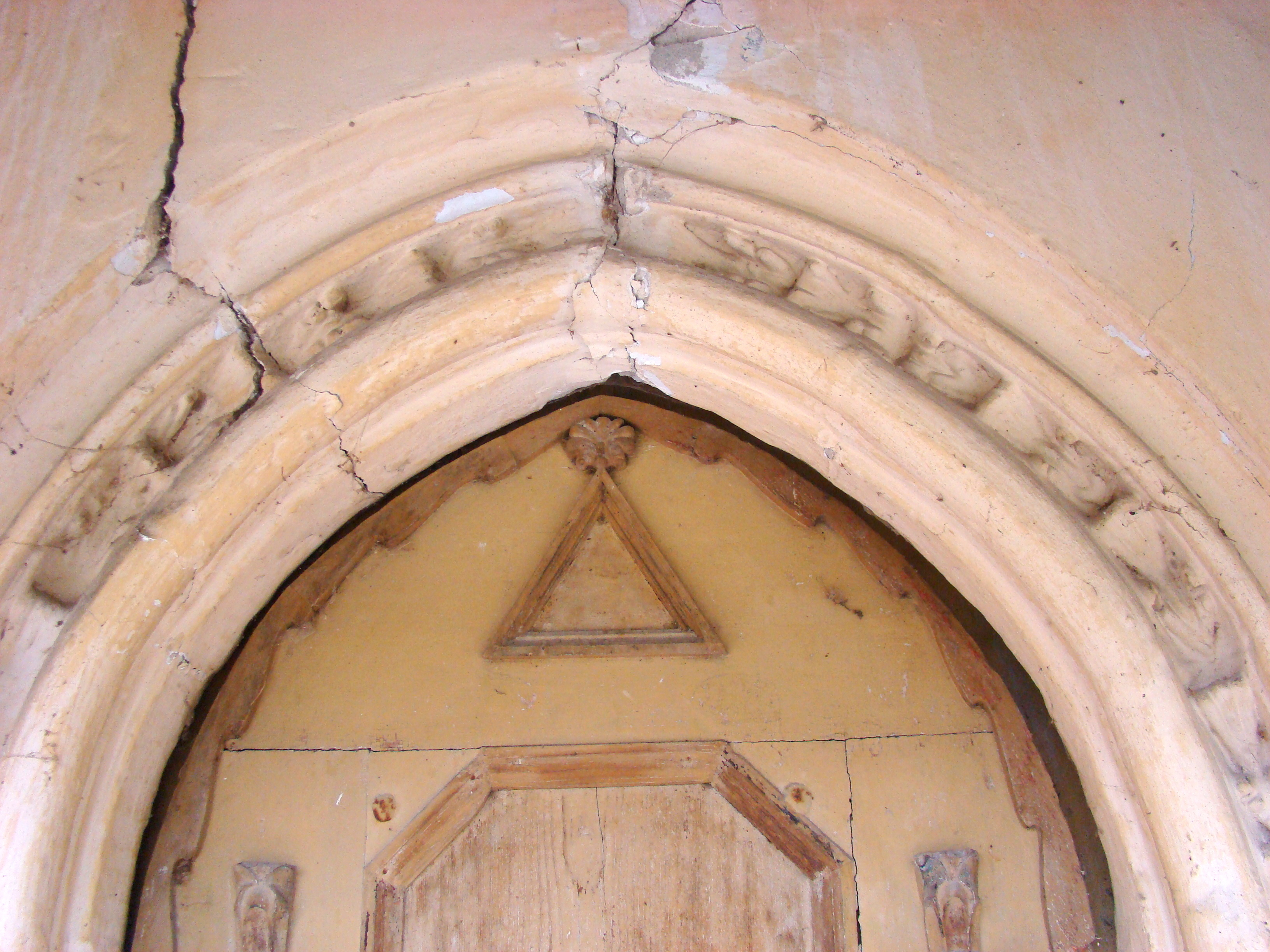 Biserica evanghelică, sat Veseuș; comuna Jidvei, județul Alba 01